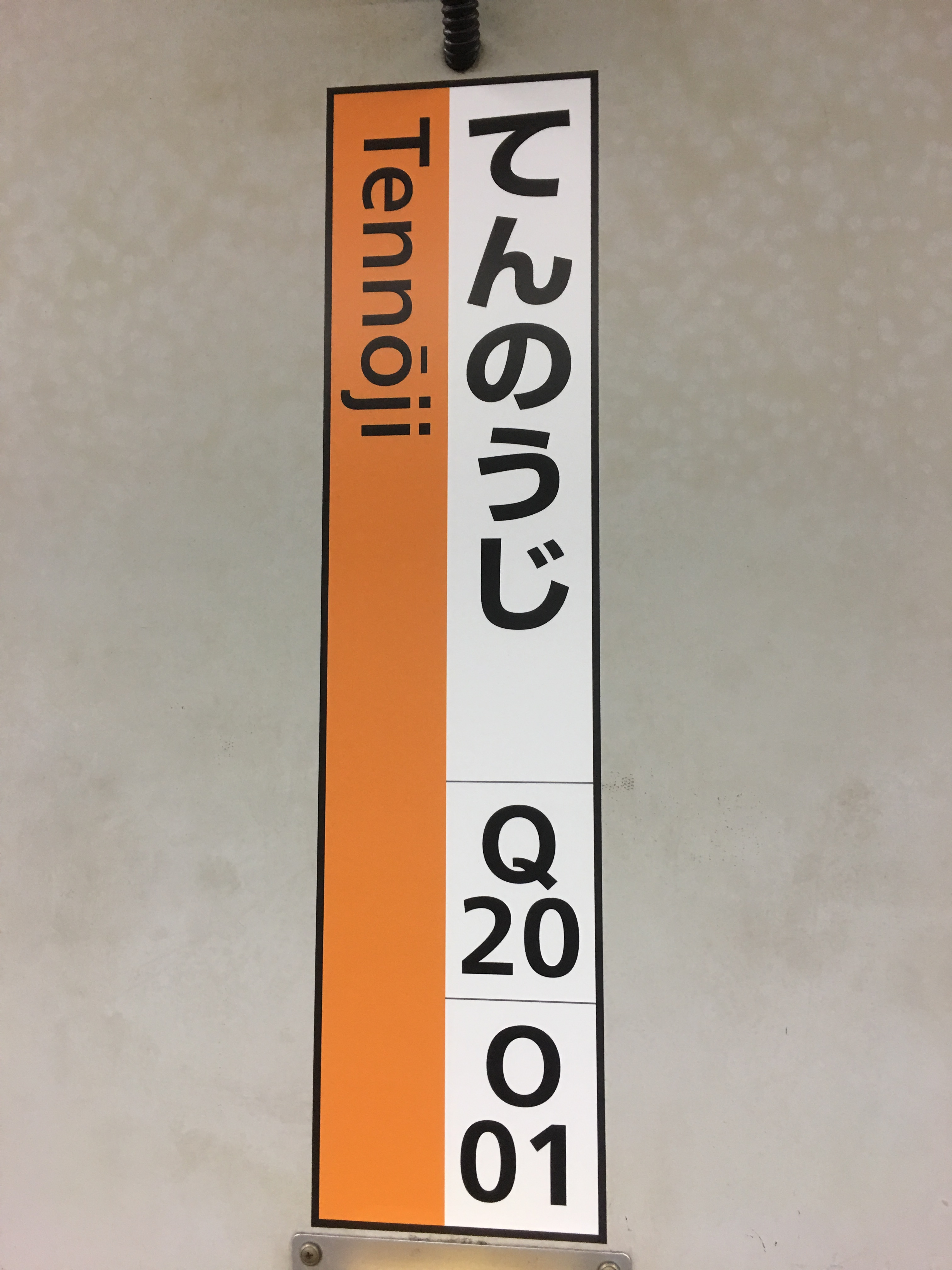 JR天王寺駅15番のりばに掲出された縦書き駅名標（2017年10月31日）